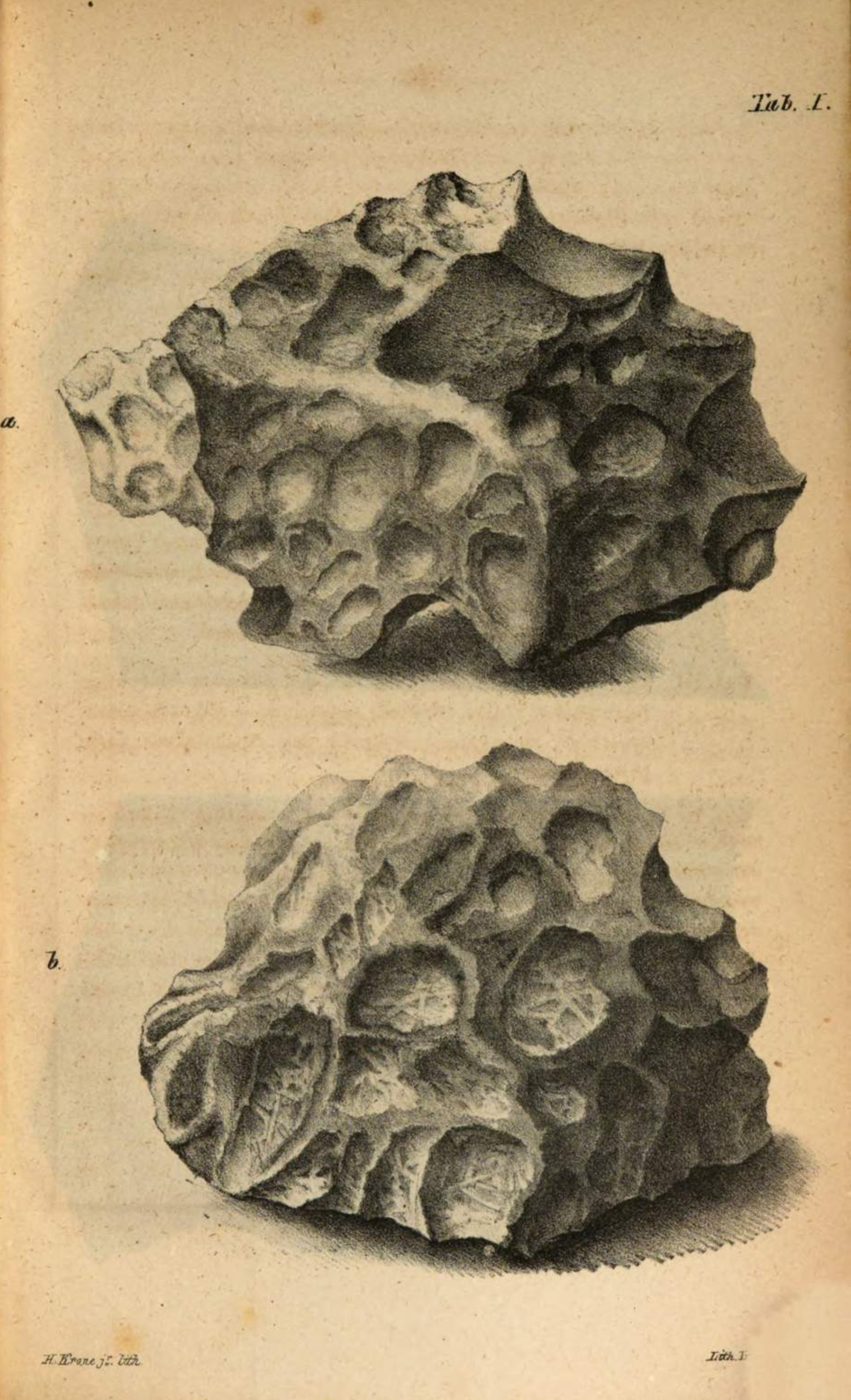 Kresba tzv. Broumovského meteoritu, který dopadl 14. června/července 1847 na území obce Hejtmánkovice.